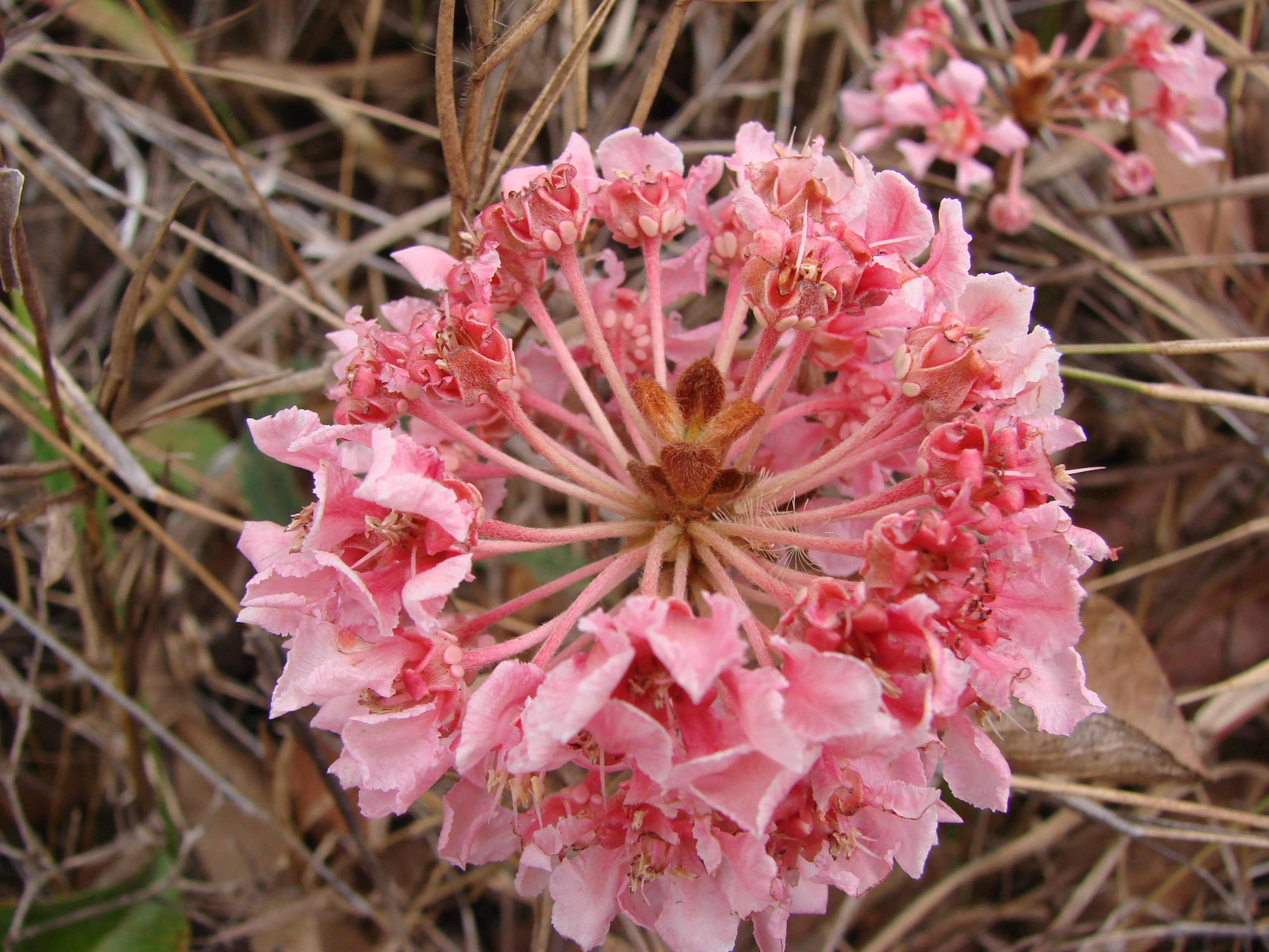 Pterandra pyroidea - MALPIGHIACEAE Parque Estadual Terra Ronca - São Domingos - Goiás - Brasil